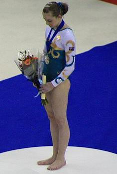 A australiana Lauren Mitchell no pódio da trave do Mundial de Londres 2009